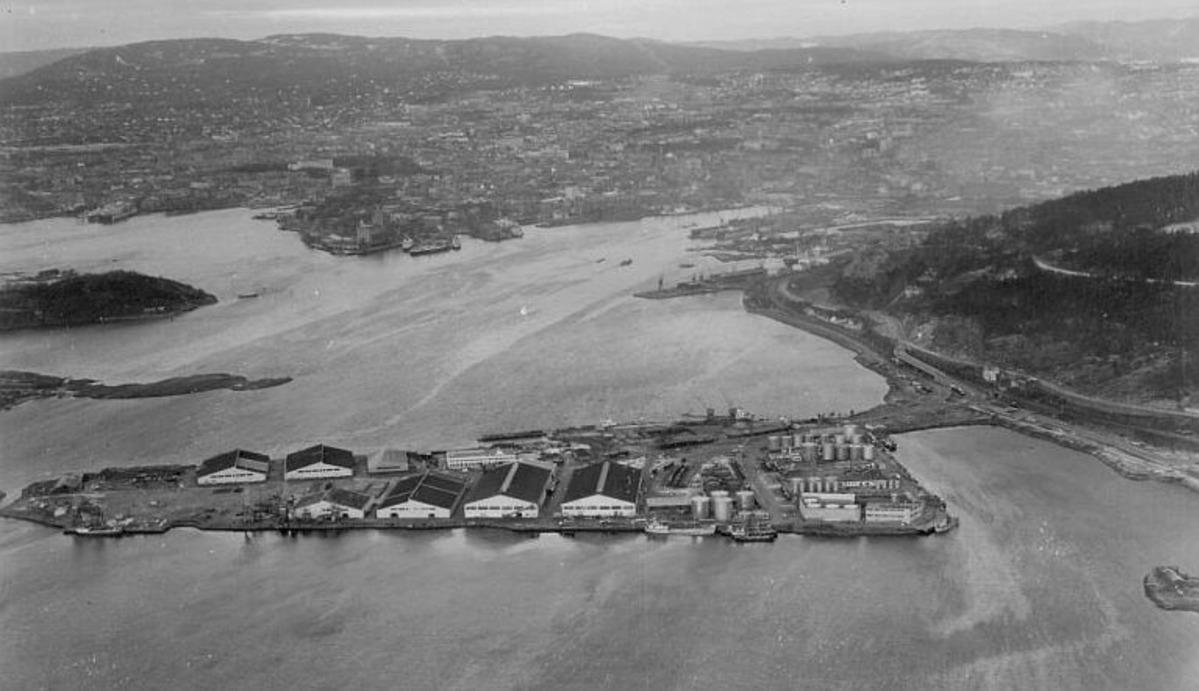 Sjursøya sett fra sør, 1956